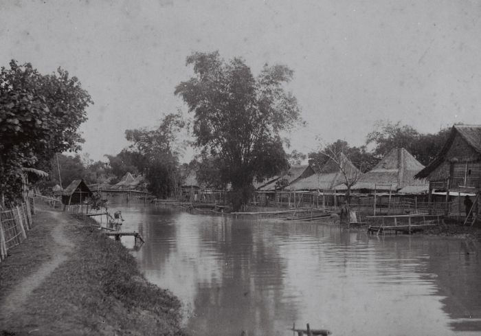 foto. Gezicht op de rivier in het dorp Sodong